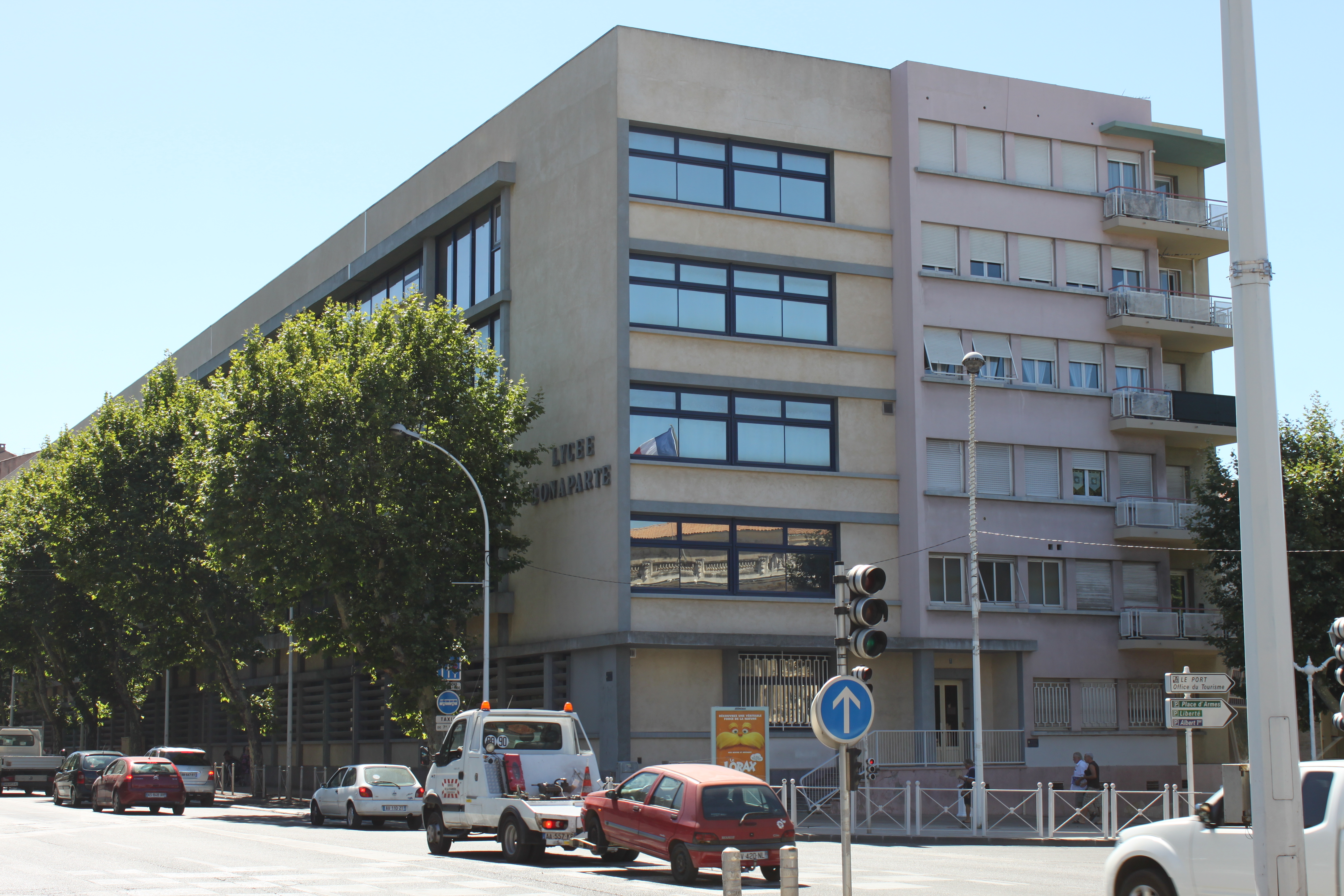 Lycée Bonaparte de Toulon. Vue Nord-Ouest du Lycée.